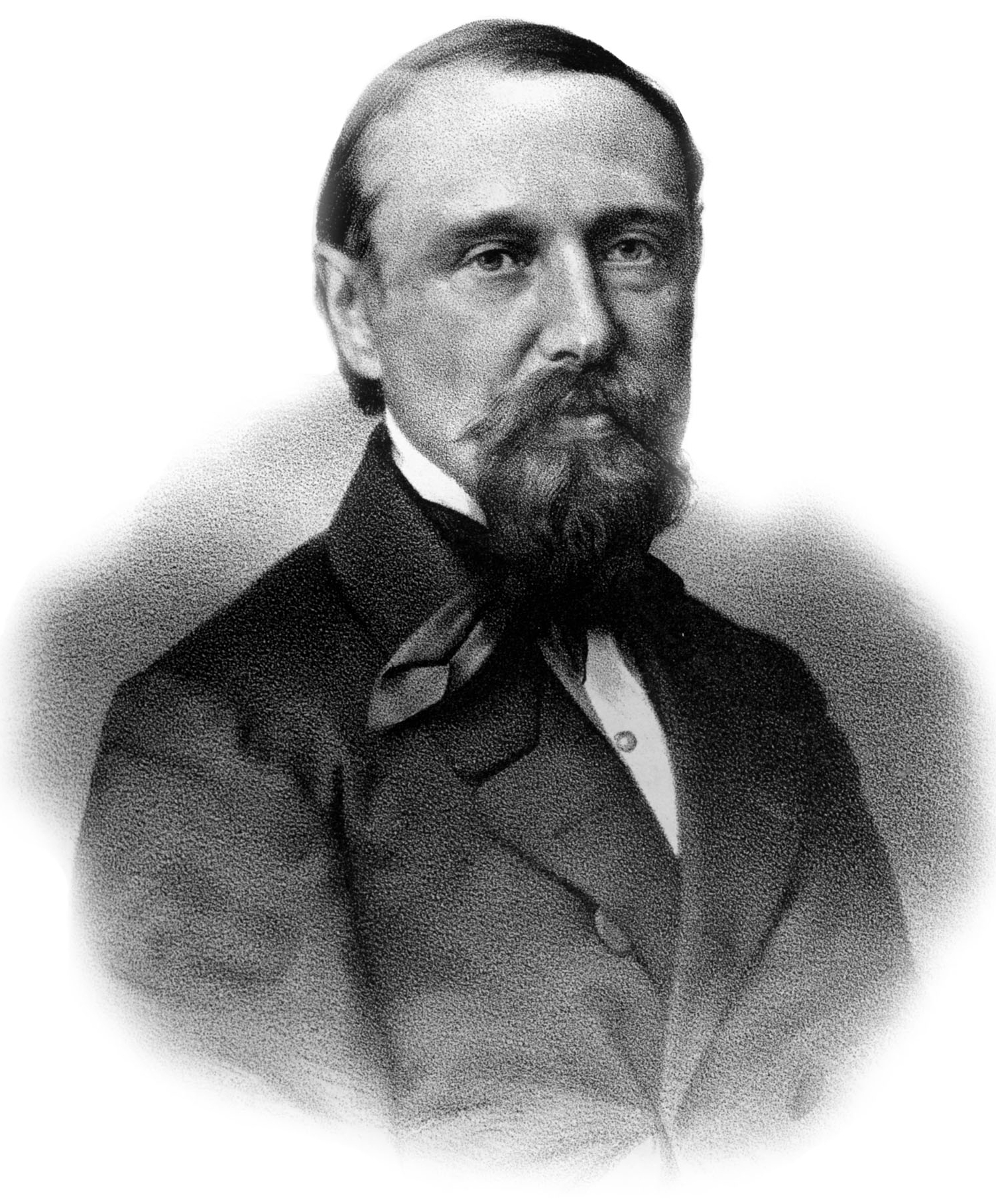 M. KATKOV. Съ Фотогр. N.N. Лит. А. Мюнстера, СПБ. Imp. Lith. A. Munster (Editeur)